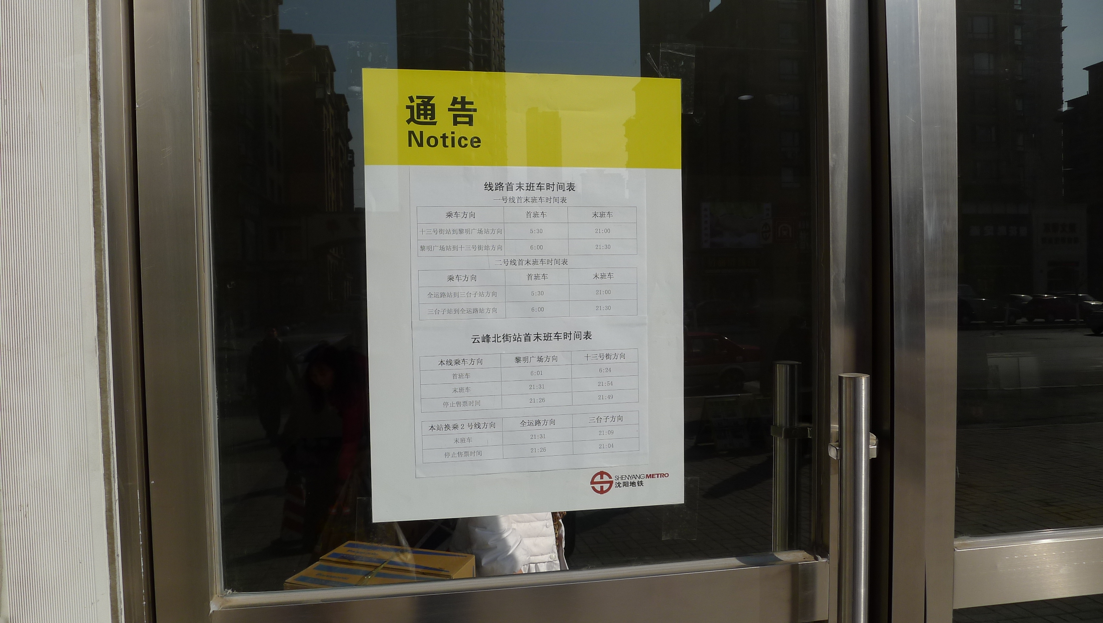 中文（中国大陆）: 沈阳地铁一号线云峰北街站时刻